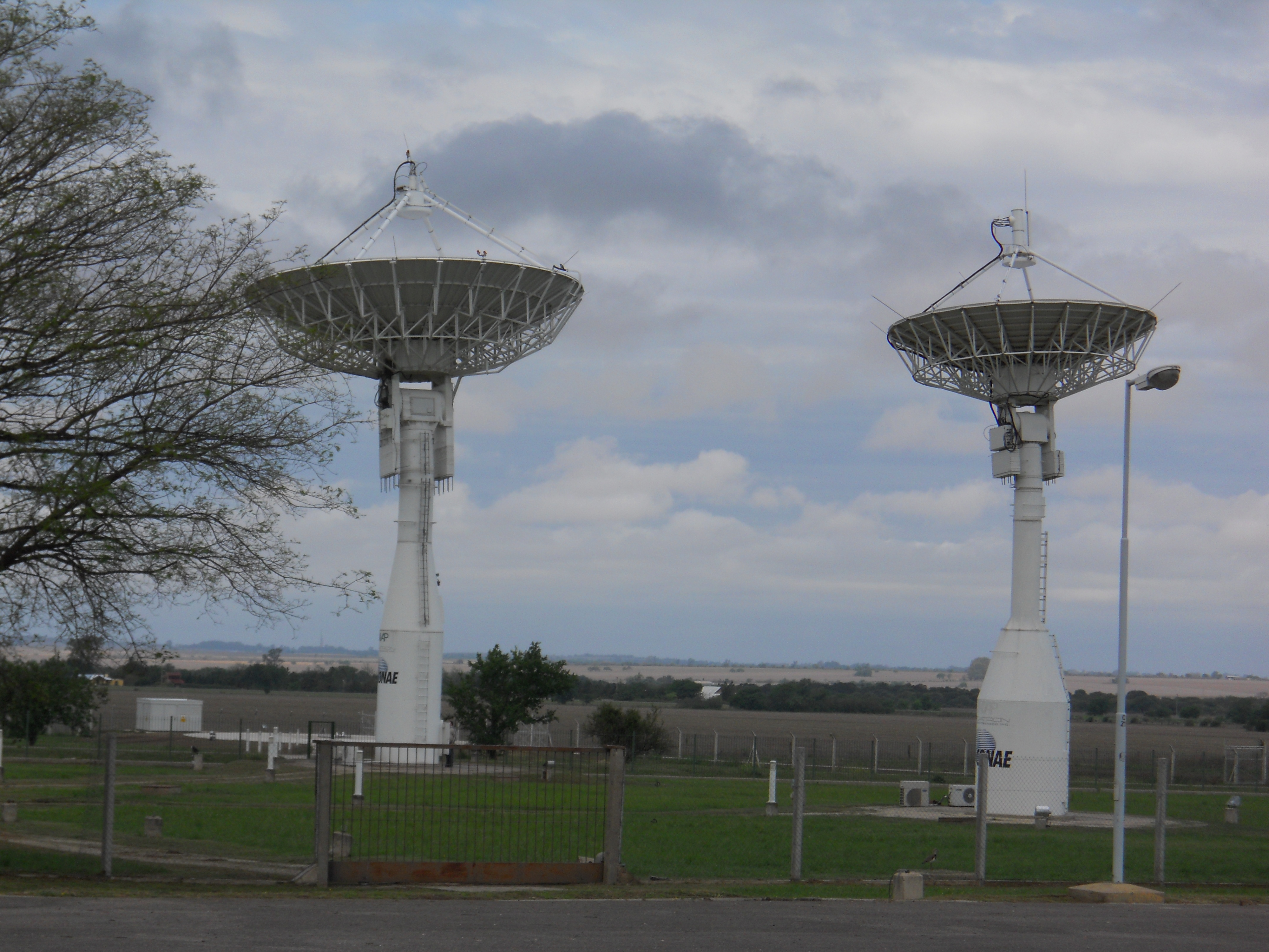 Antenas de la CONAE en la Estacion Terrena del Centro Espacial Teófilo Tabanera